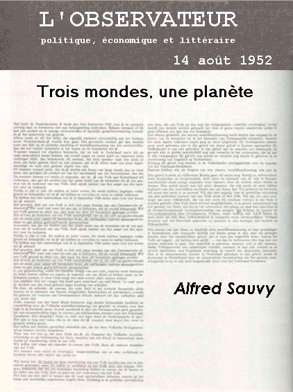 Infografía sobre el artículo "Tres mundos, un planeta" de Alfred Sauvy. AVISO: NO SE TRATA DE UNA REPRODUCCION DE LA PUBLICACION ORIGINAL. IT'S NOT THE ORIGINAL PUBLICATION.